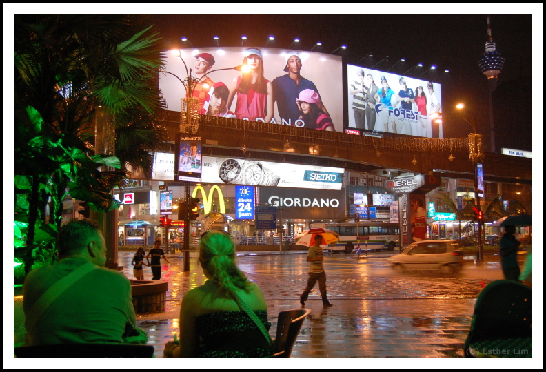 Bukit Bintang at night.